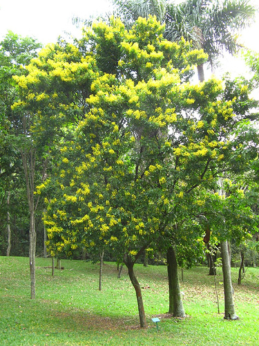 pau brasil